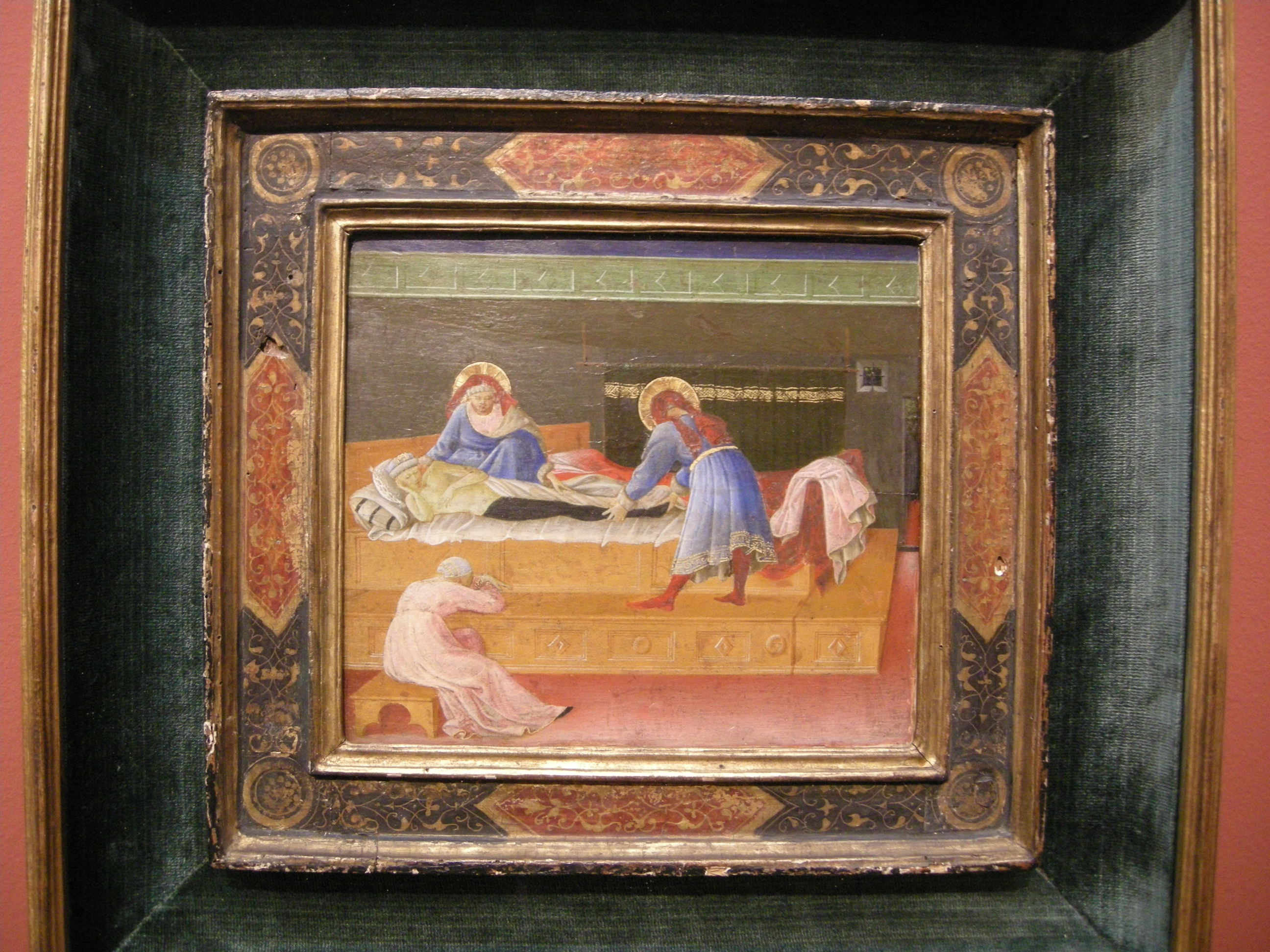 Beato angelico e zanobi strozzi, santi cosma e edamiano guariscono il diacono giustiniano, dalla pala di annalena, 1445 circa